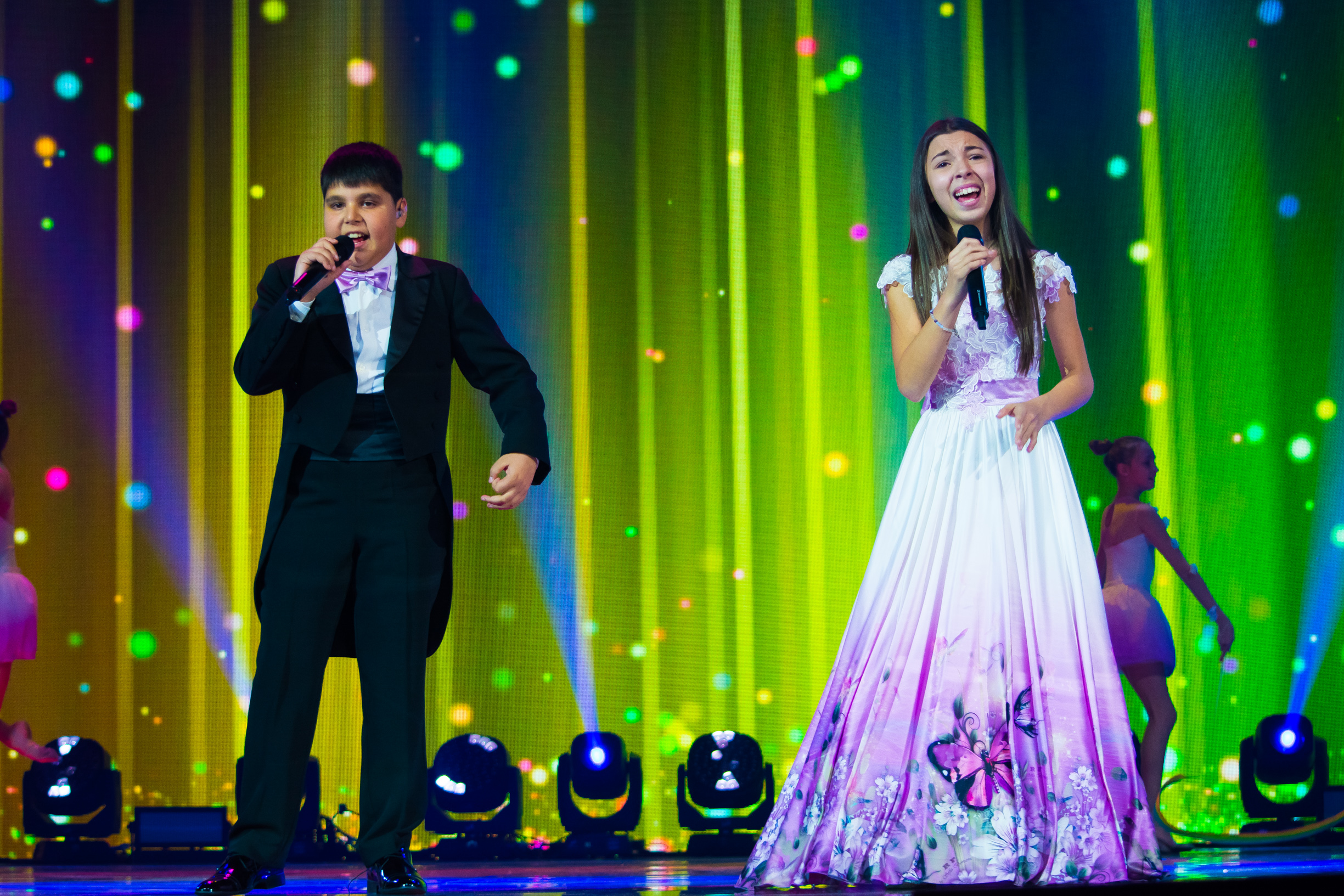 Габриела Йорданова и Иван Стоянов на сцене Детского Евровидения 2015 («Армеец», София) во время генеральной репетиции